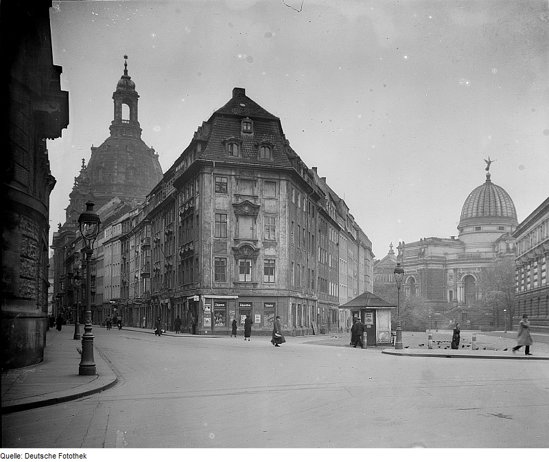 Original image description from the Deutsche Fotothek Dresden. Blick gegen Frauenkirche und Kunstakademie von der Rampischen Gasse und Salzgasse